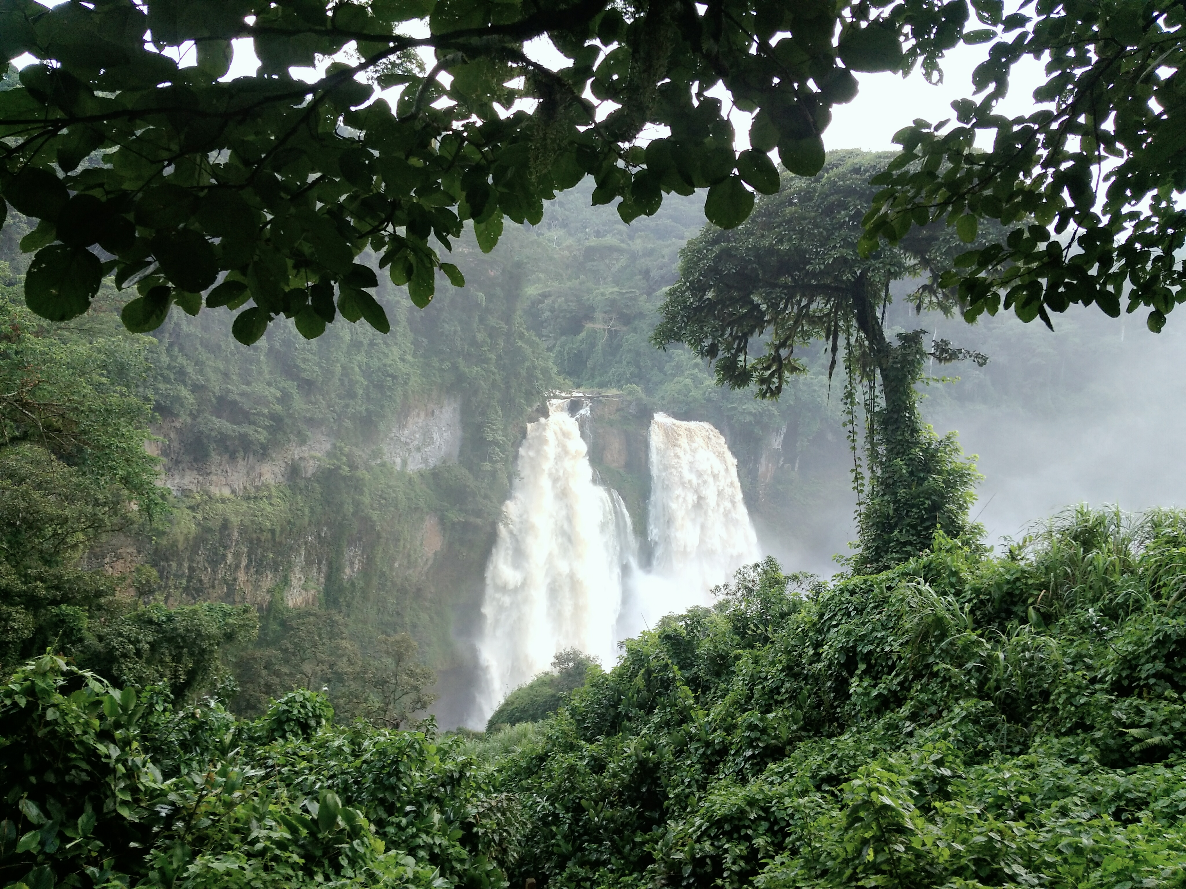 Chûtes-d-Ekom-Nkam. Cette image présente les chûtes d'Ekom-Nkam, situées à proximité de la ville de Melong , dans la région du Littoral